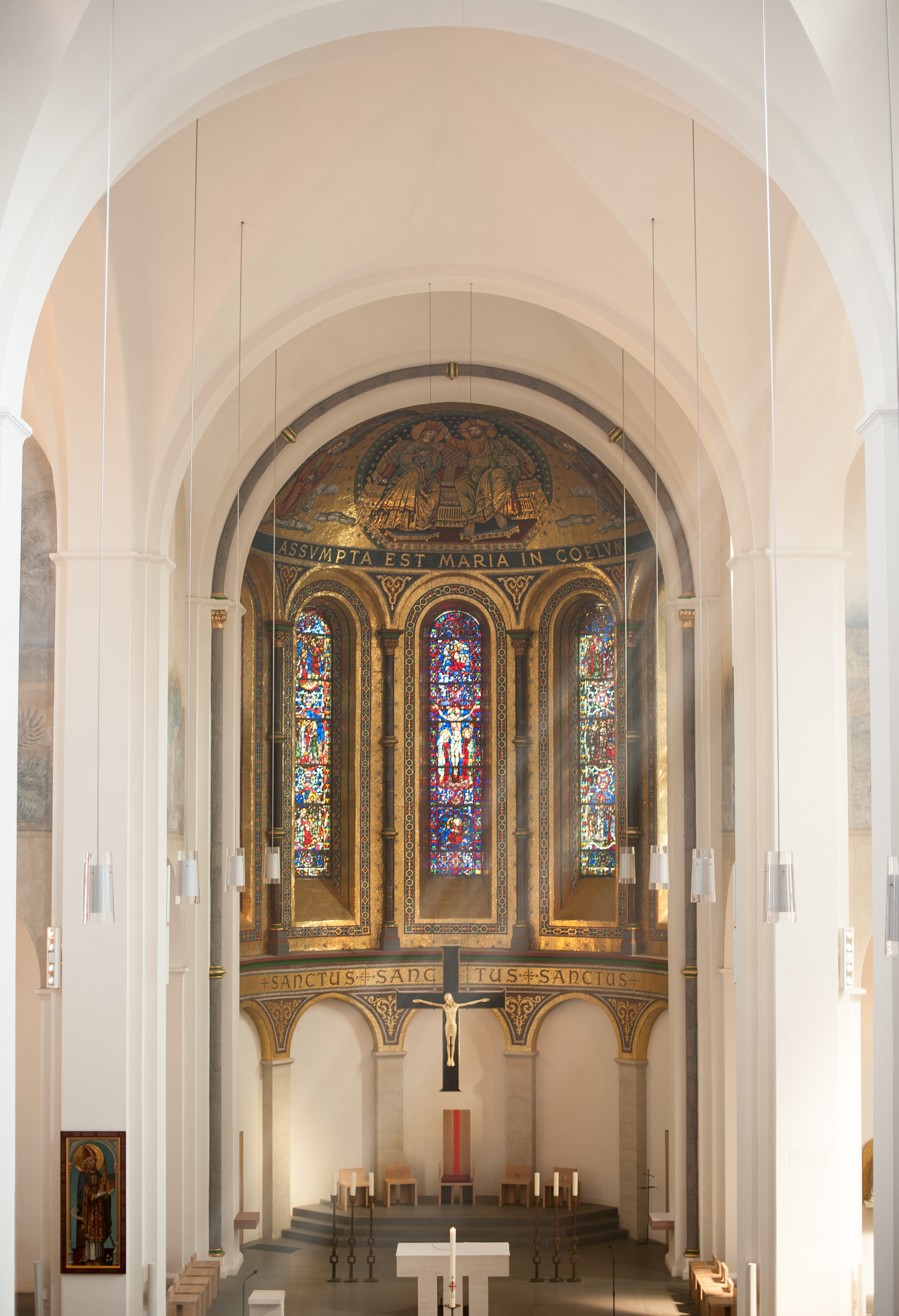 St. Marienkirche Hamburg